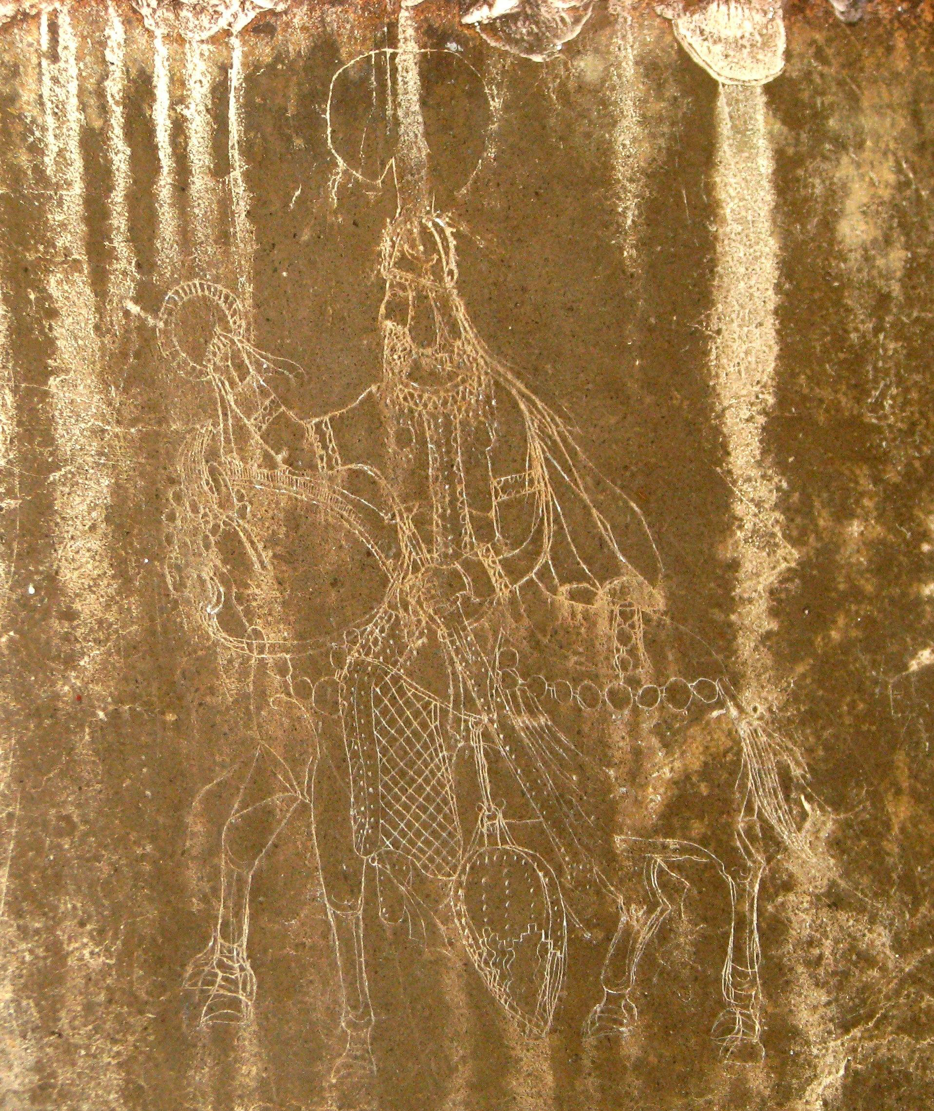 نقش سوزنی شاپور پسر بابک کنده‌شده بر دیوار کاخ تچر در تخت جمشید